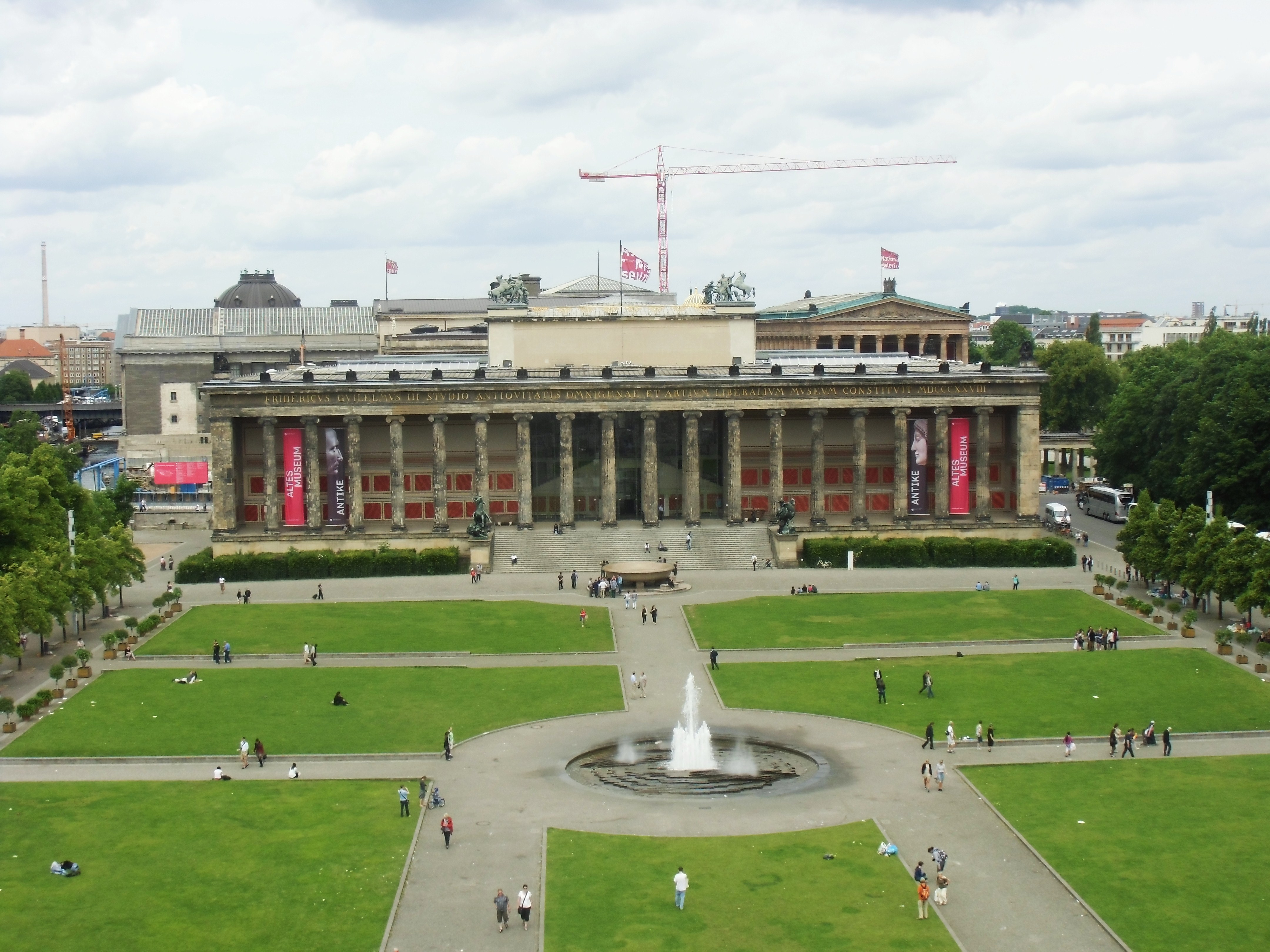 Blick von der Humboldt-Box über den Lustgarten auf das Alte Museum, errichtet 1824-1830 nach Plänen von Karl Friedrich Schinkel